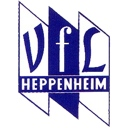 Logo VfL Heppenheim